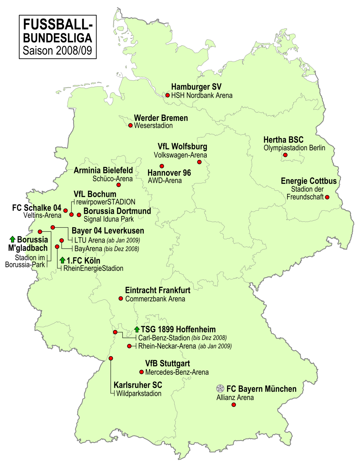 Karte der Vereine der Fußball-Bundesliga-Saison 2008/2009